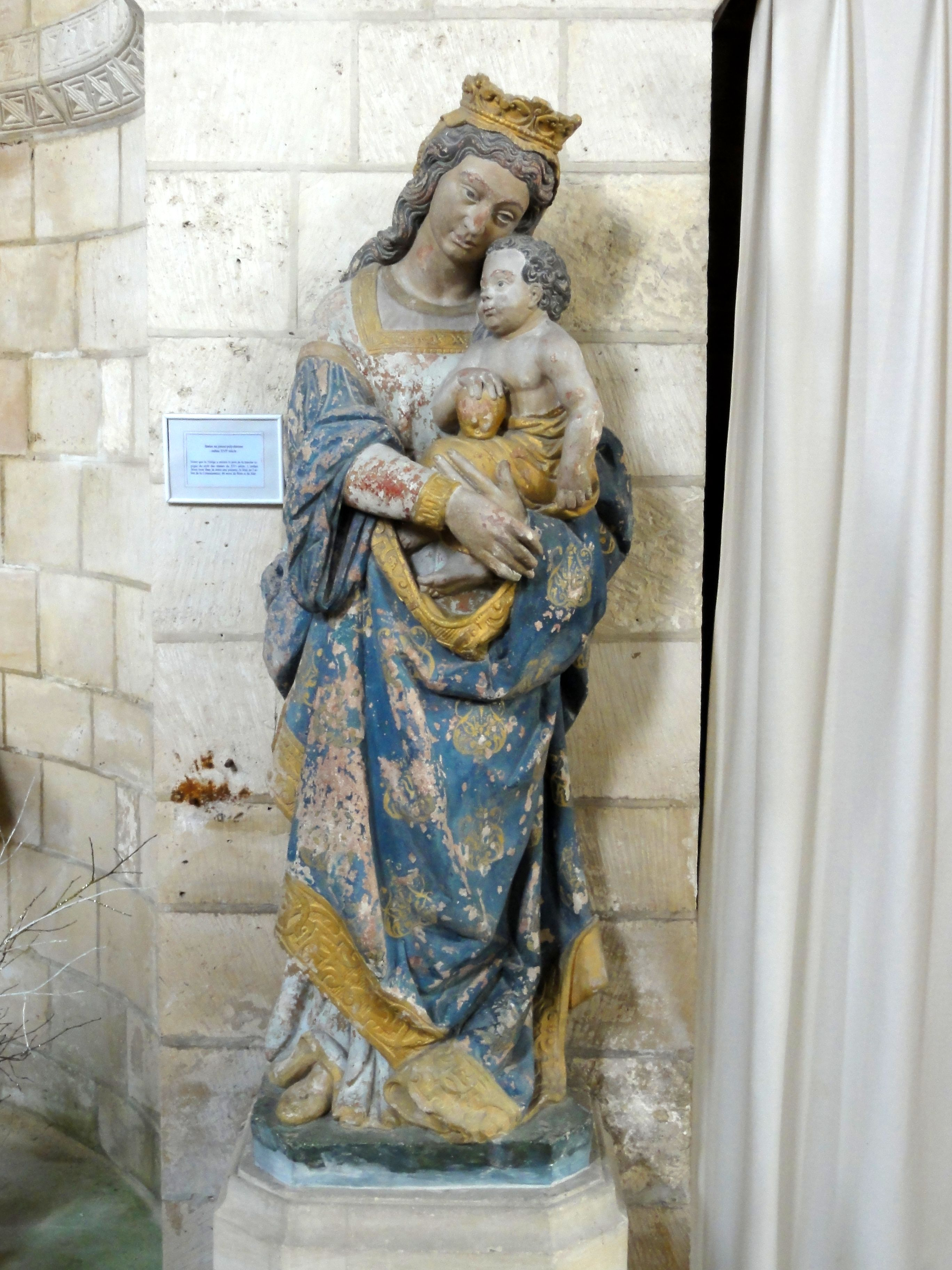 Vierge à l'Enfant.